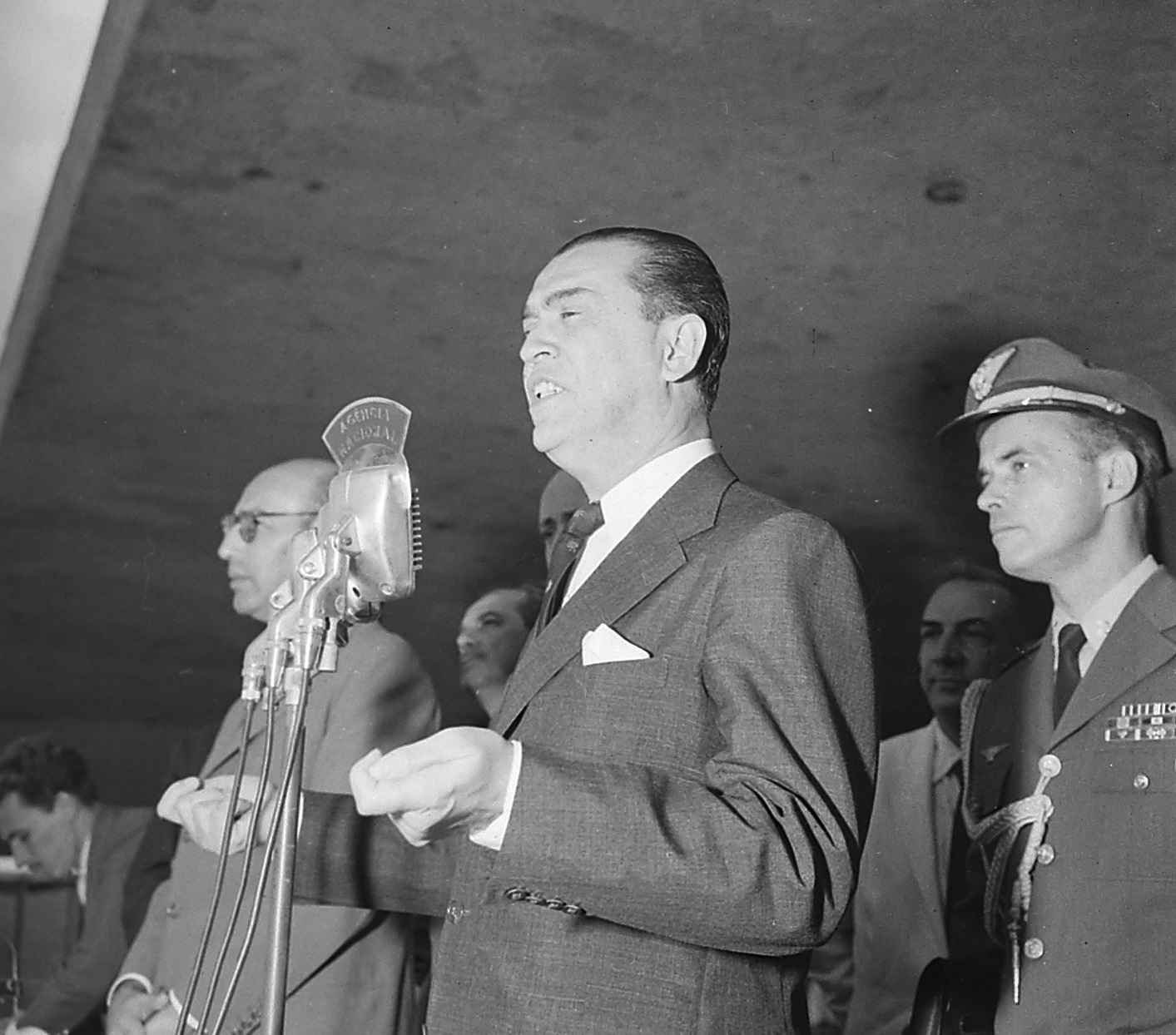 Imagem do Fundo Agência Nacional, do Arquivo Nacional